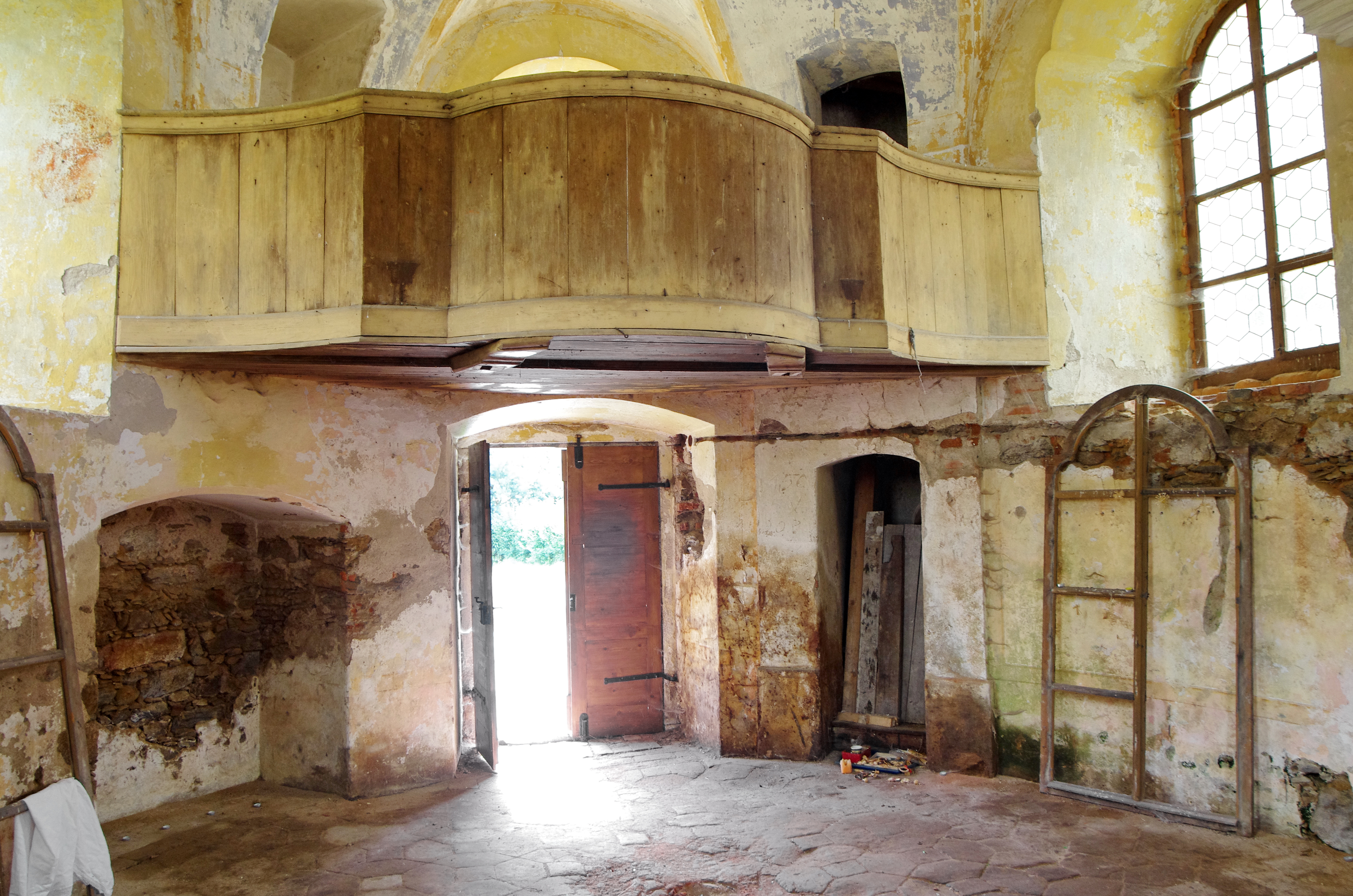 Dolní Hluboká, kaple sv. Prokopa, okres Sokolov